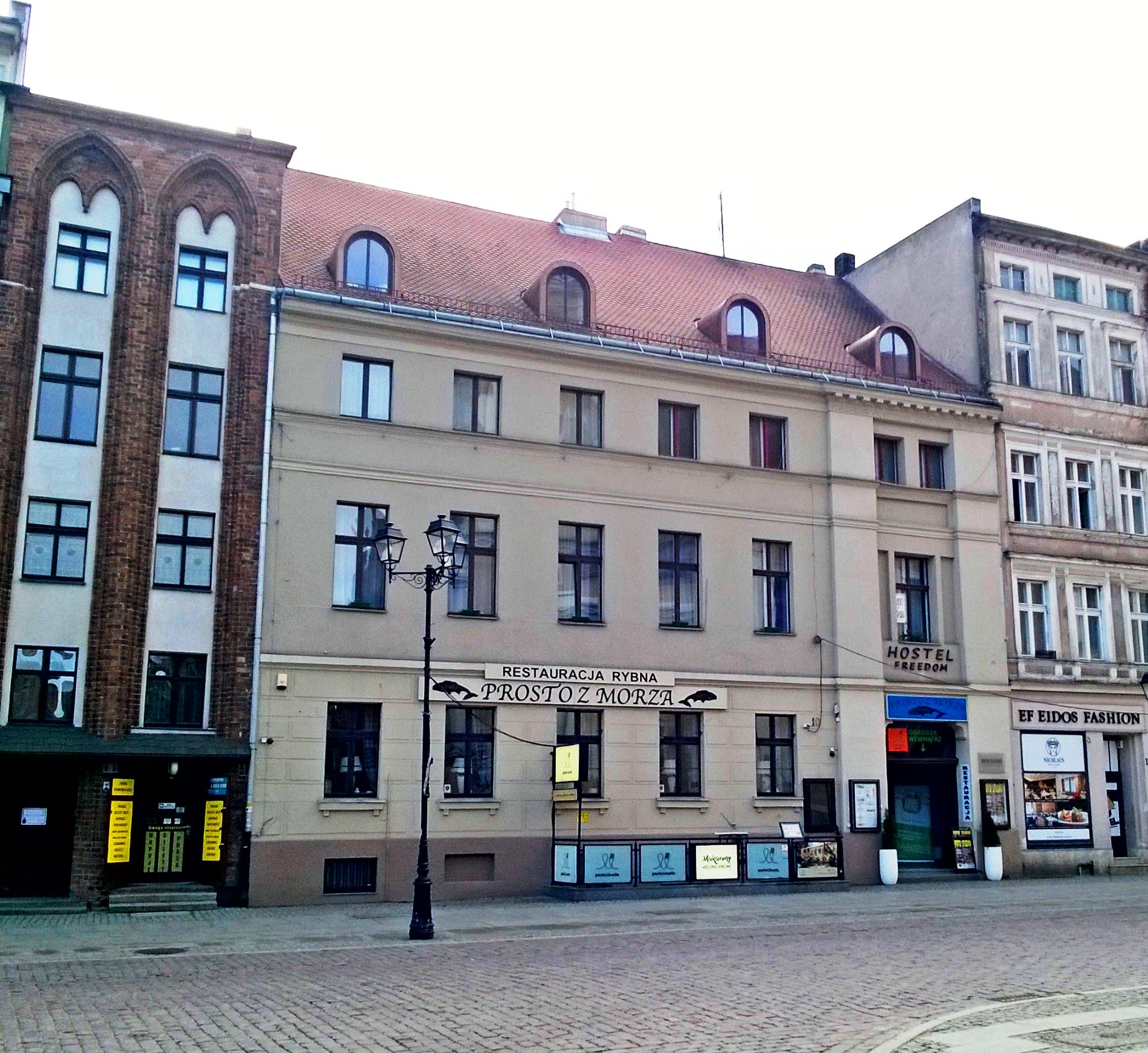 Komendantura Twierdzy Toruń